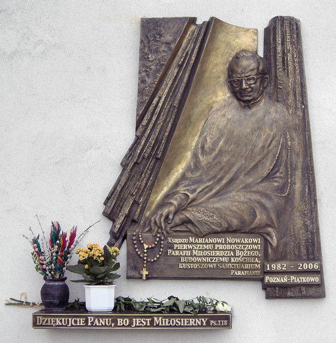 Tablica pamiątkowa na kościele Miłosierdzia Bożego w Poznaniu, Polska. Przedstawia pierwszego proboszcze parafii Mariana Nowaka.